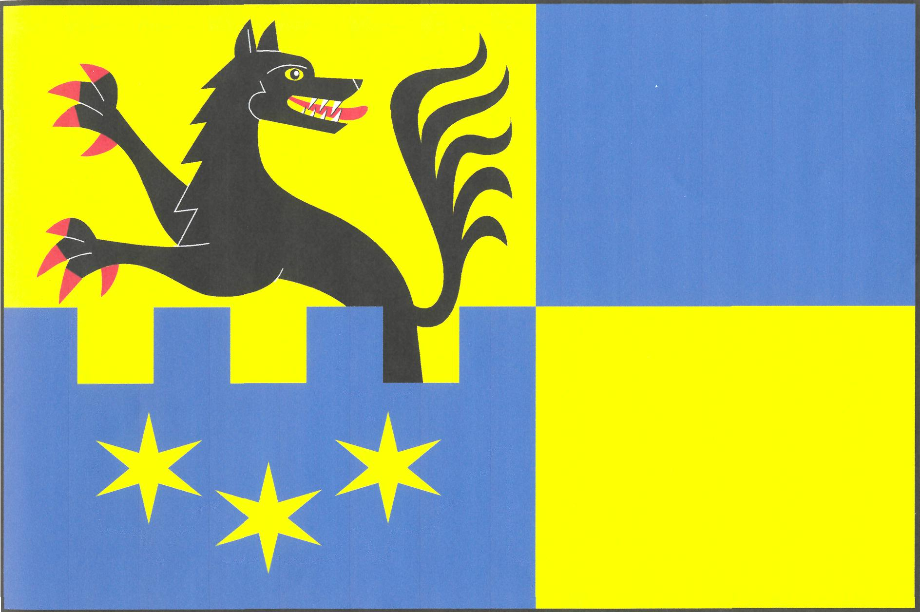 Vlajka obce Volfartice